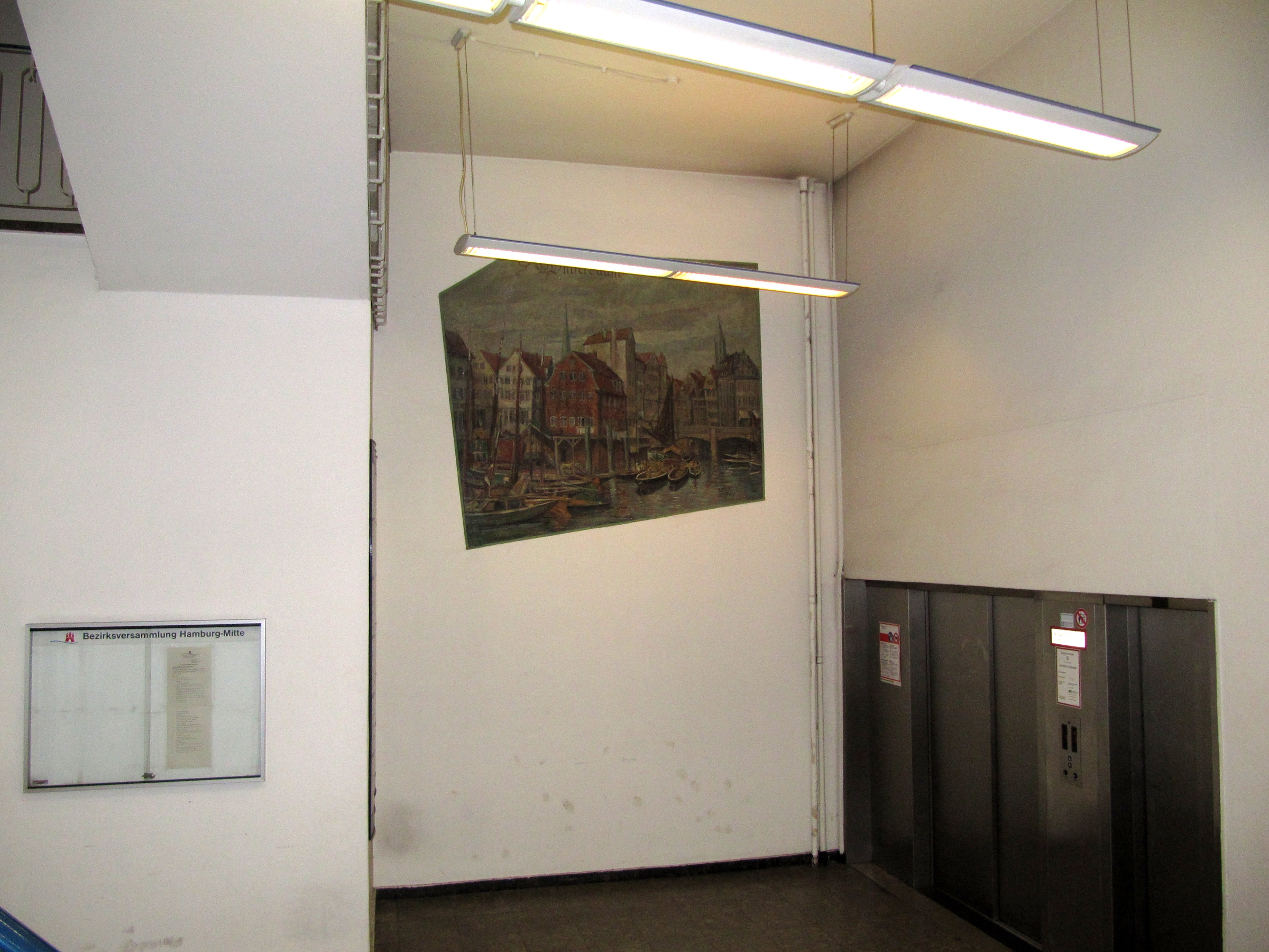 Wandmalereien des Künstlers "Reimer" (1956/1957) in den Foyers der City-Hof-Hochhäusern A, B und C, Klosterwall, Hamburg (15. Dezember 2015).